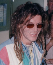 Hans Söllner bei einer Gerichtsverhandlung 1997, Foto von Thomas Gensler